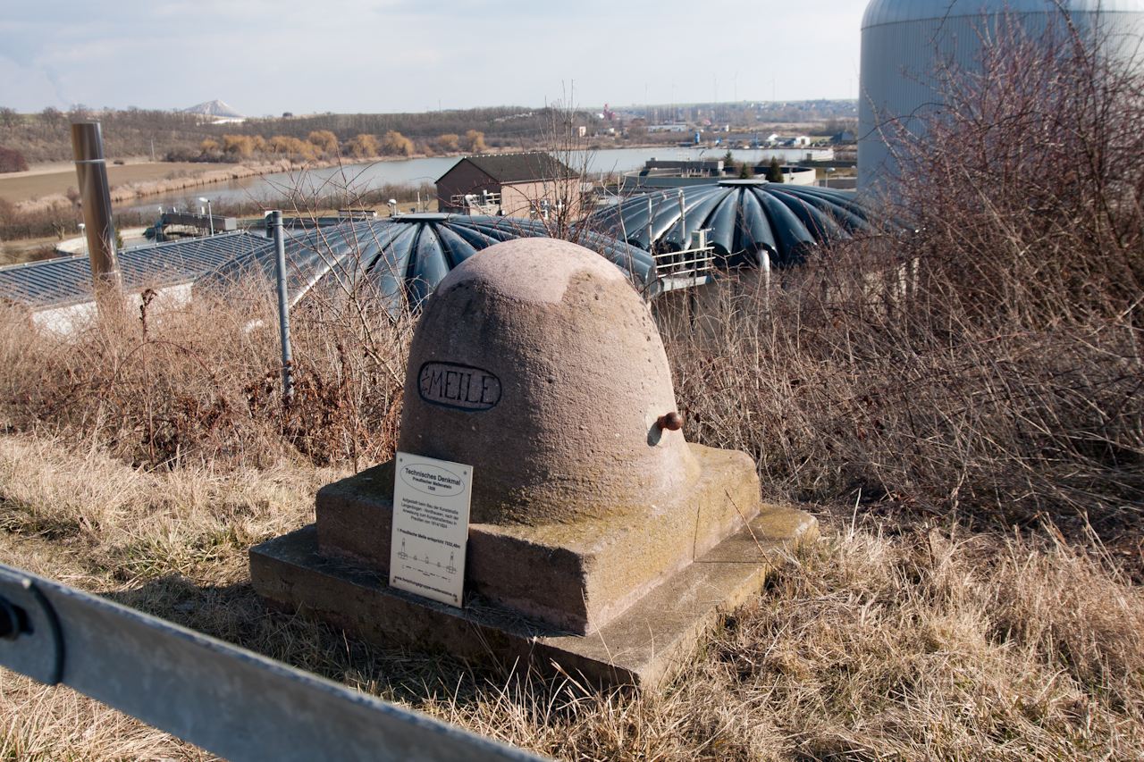 Preußischer Viertelmeilenstein östlich von Rollsdorf an der ehemaligen Kunststraße Langenbogen–Eisleben–Sangerhausen–Nordhausen, der 1826 gesetzt wurde.